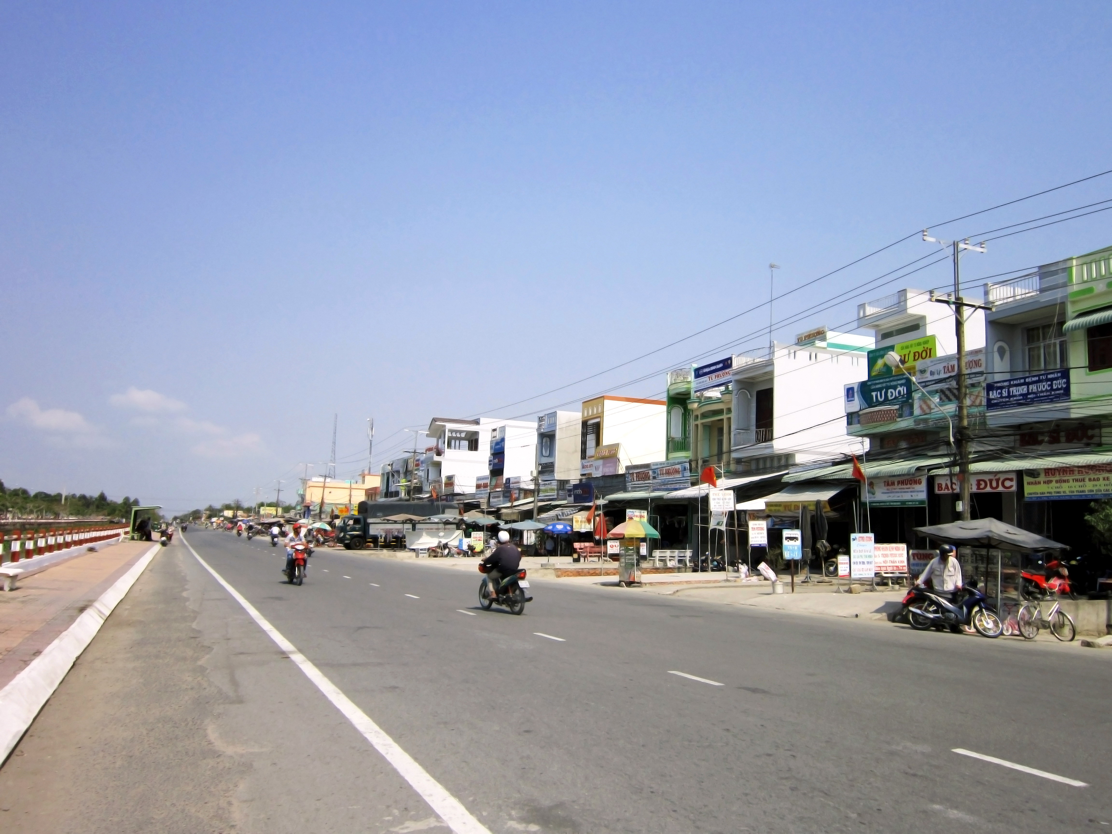 Trên Quốc lộ 61, đoạn đi qua thị trấn Nàng Mau, thuộc huyện Vị Thủy, tỉnh Hậu Giang, Việt Nam.